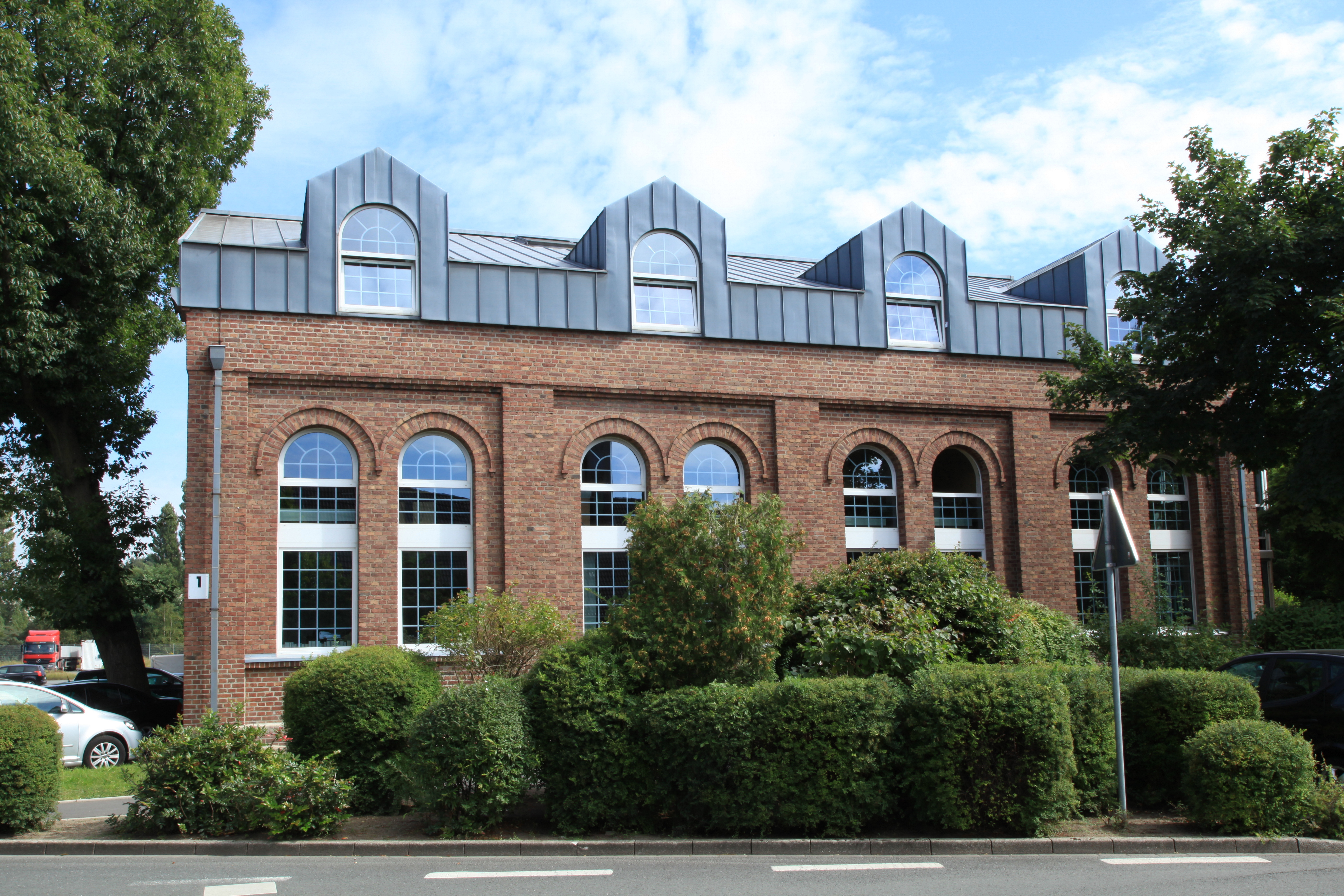 Verbliebene Gebäude der Zeche Rheinbaben, jetzt in Benutzung und auf dem Firmengelände von Eurovia Teerbau GmbH NL Bottrop, Rheinbabenstraße 75 in Bottrop. Die Aufnahmen auf dem eigentlich nicht zugänglichen Firmengelände entstanden mit freundlicher Genehmigung der Eurovia Teerbau GmbH.